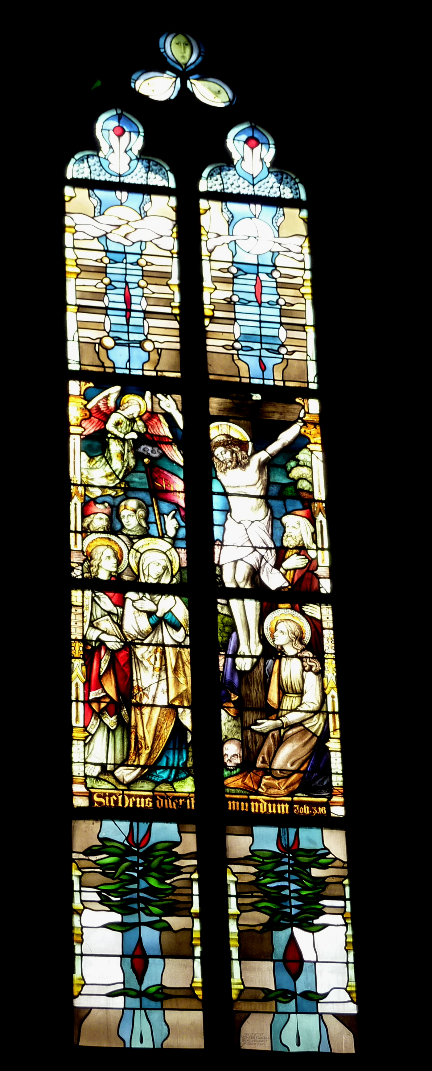 Bleiglasfenster im Chor der katholischen Pfarrkirche St. Martinus in Kirchheim, Darstellung: Kreuzigung